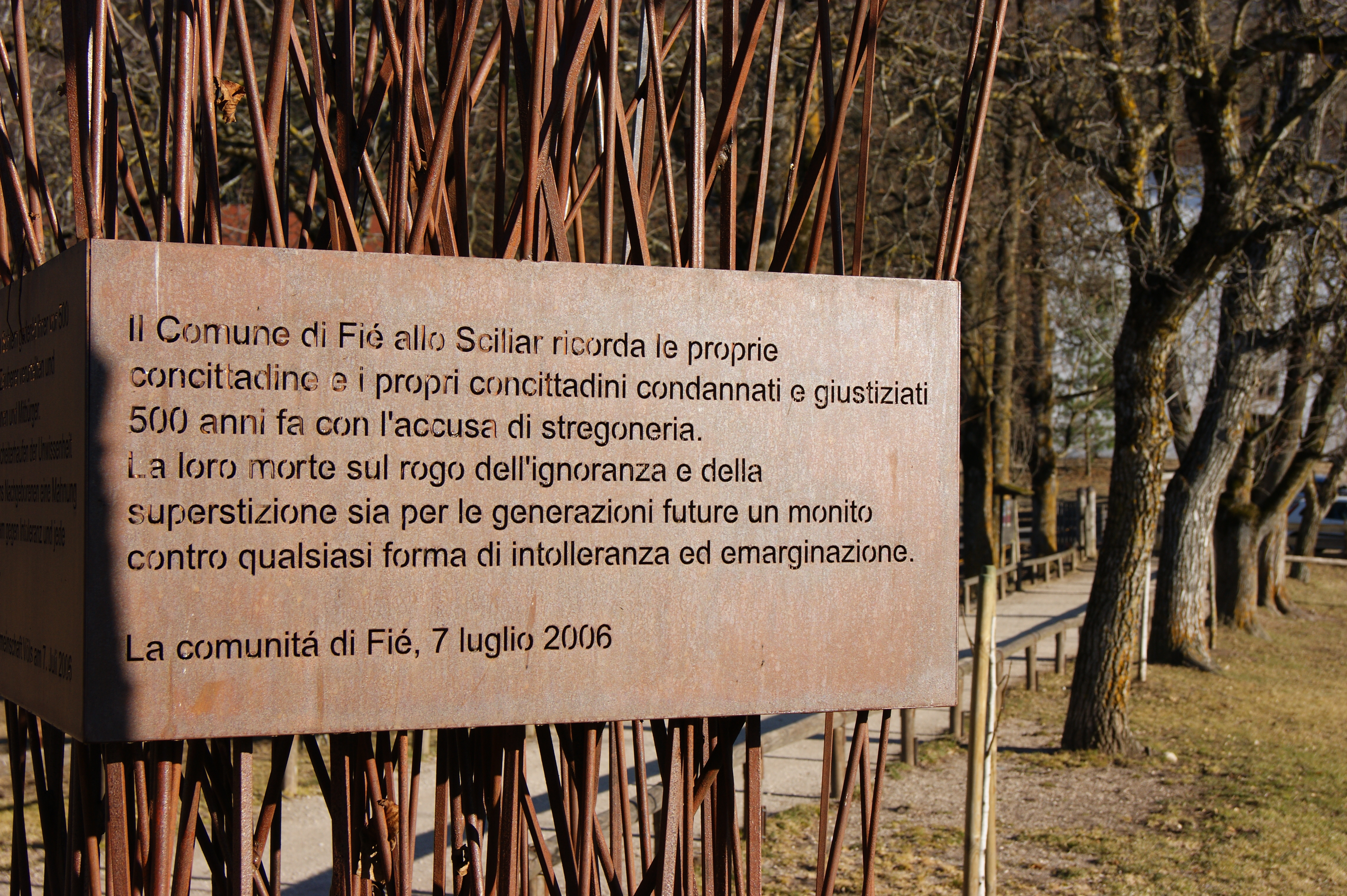 Parco naturale dello Sciliar-Catinaccio (Q520612)